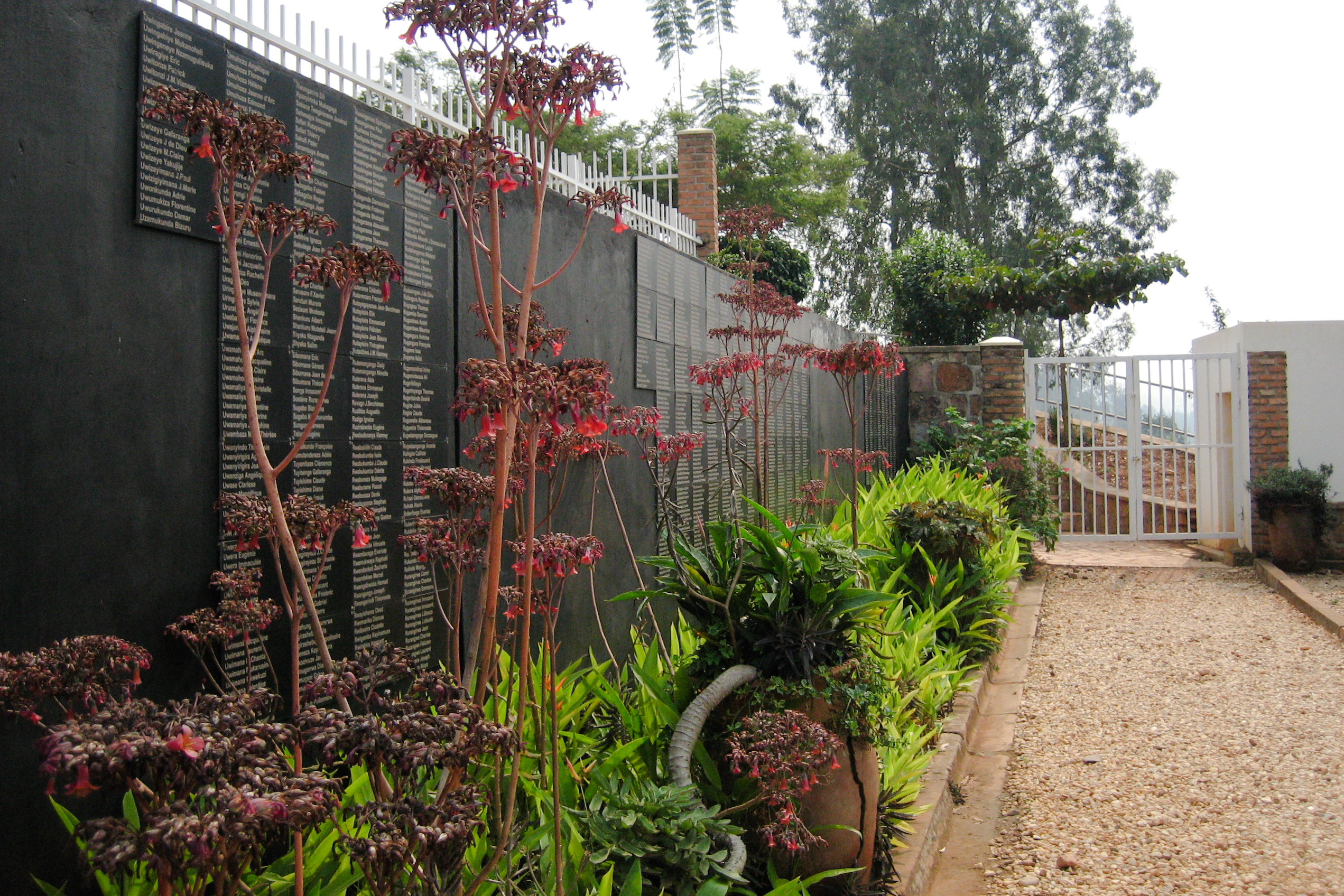 Kigali Memorial Centre, Gisozi.